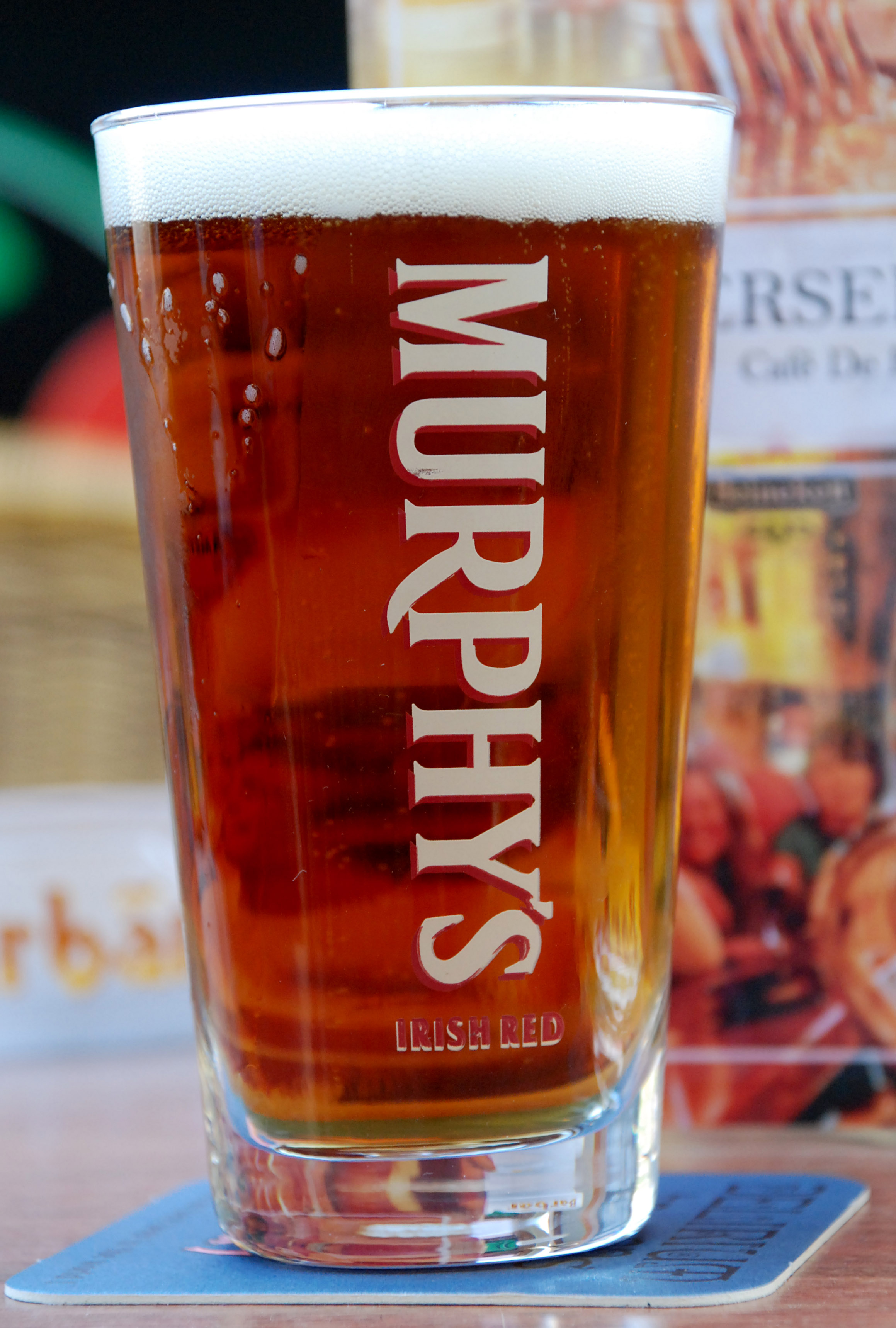 Murphys